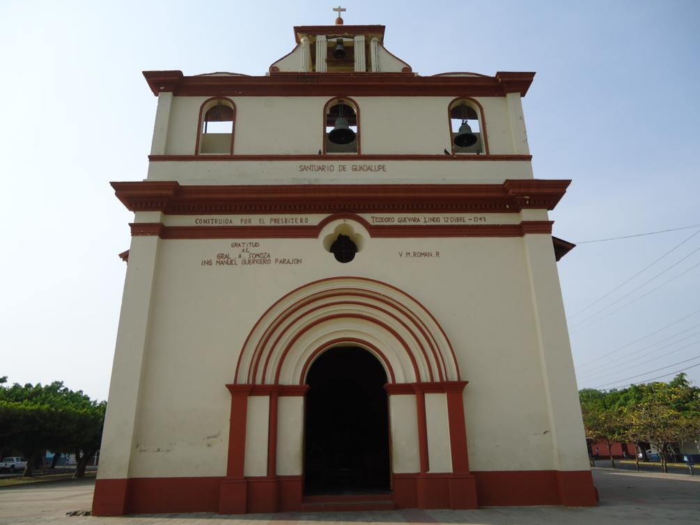 Guadalupe iglesia León, Nicaragua por Richard Weiss